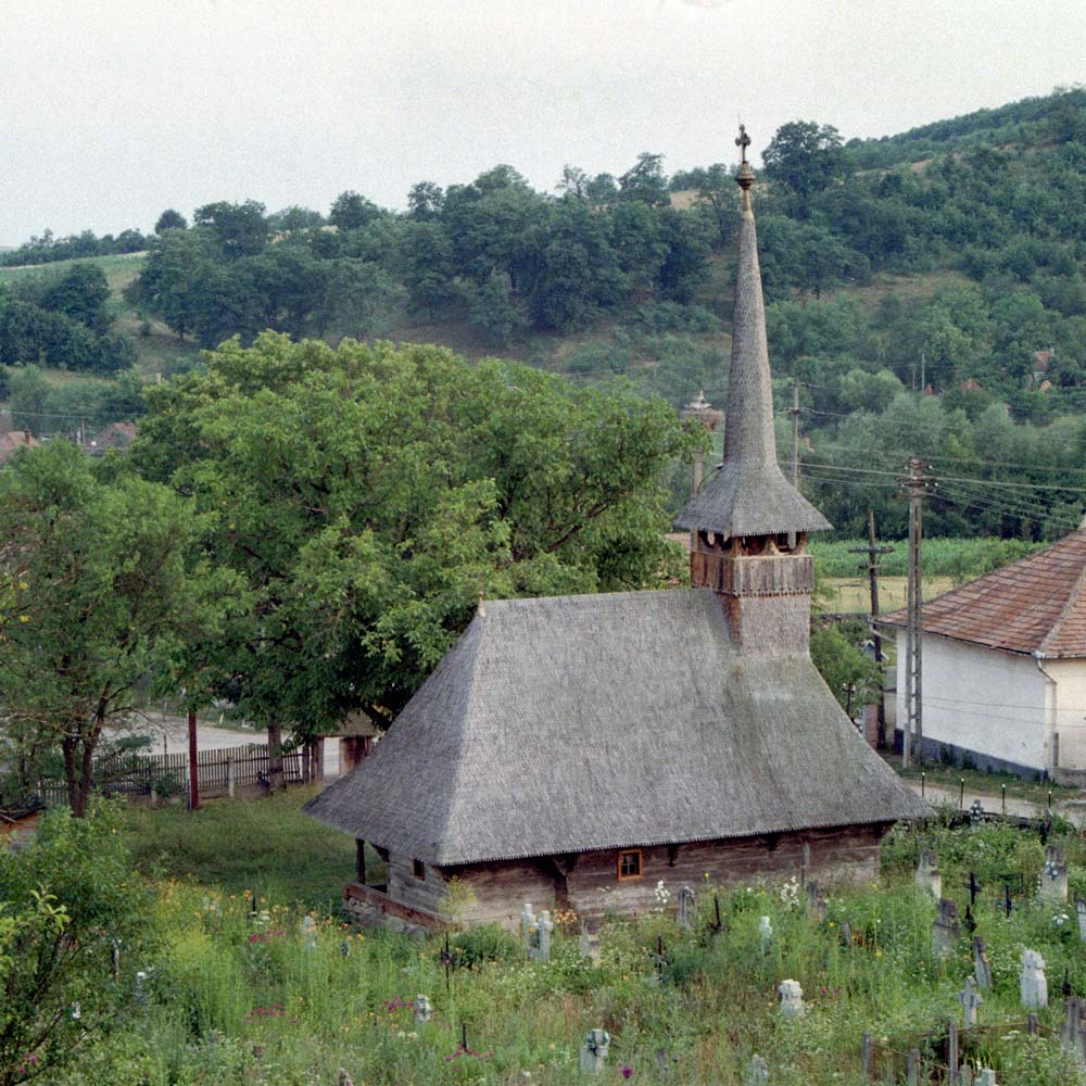 Biserica de lemn din Creaca, perspectivă de pe deal. Foto: Alexandru Baboş, iulie 2002. Categorie:Biserici de lemn din Sălaj (imagini)